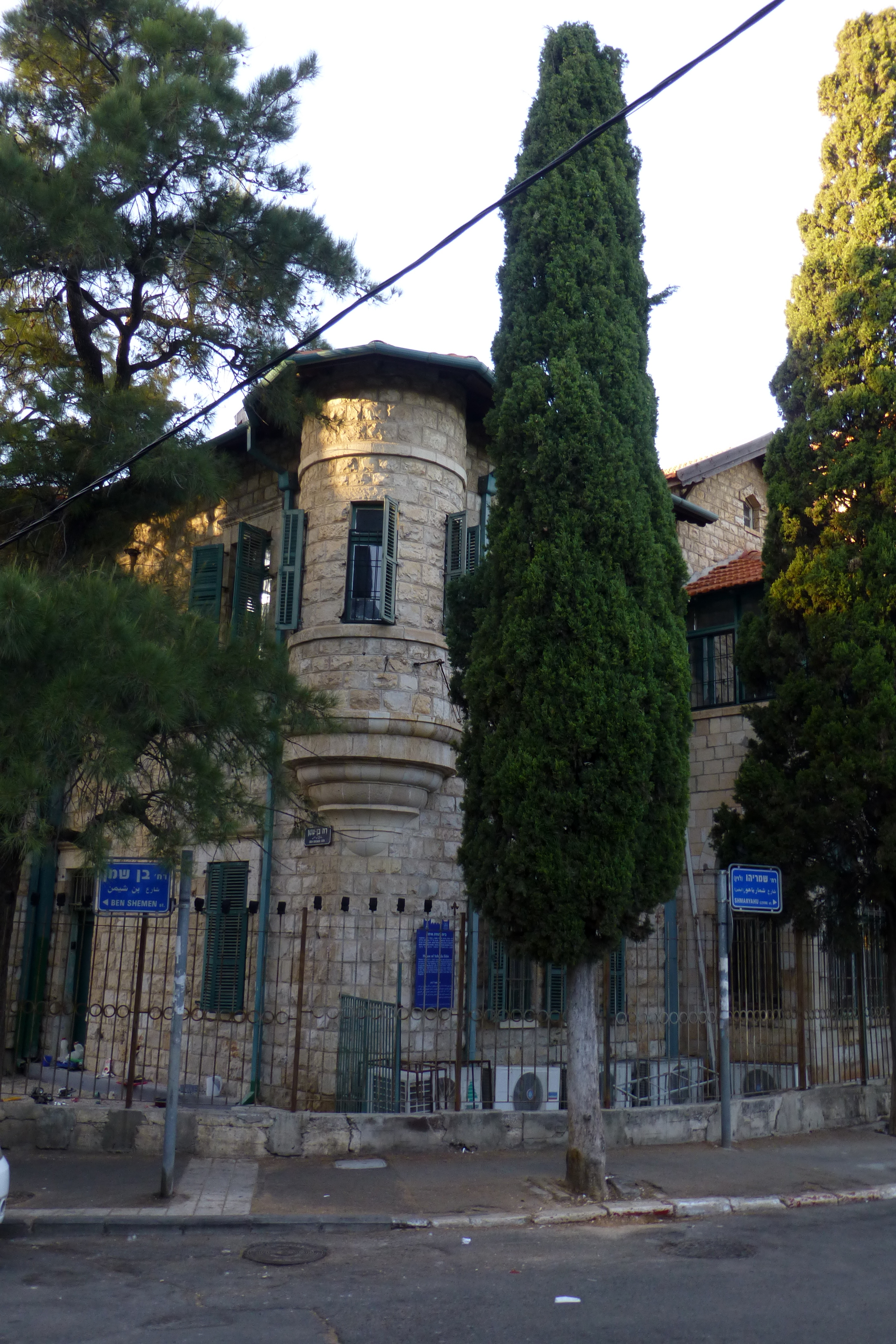 בית איתין בחיפה